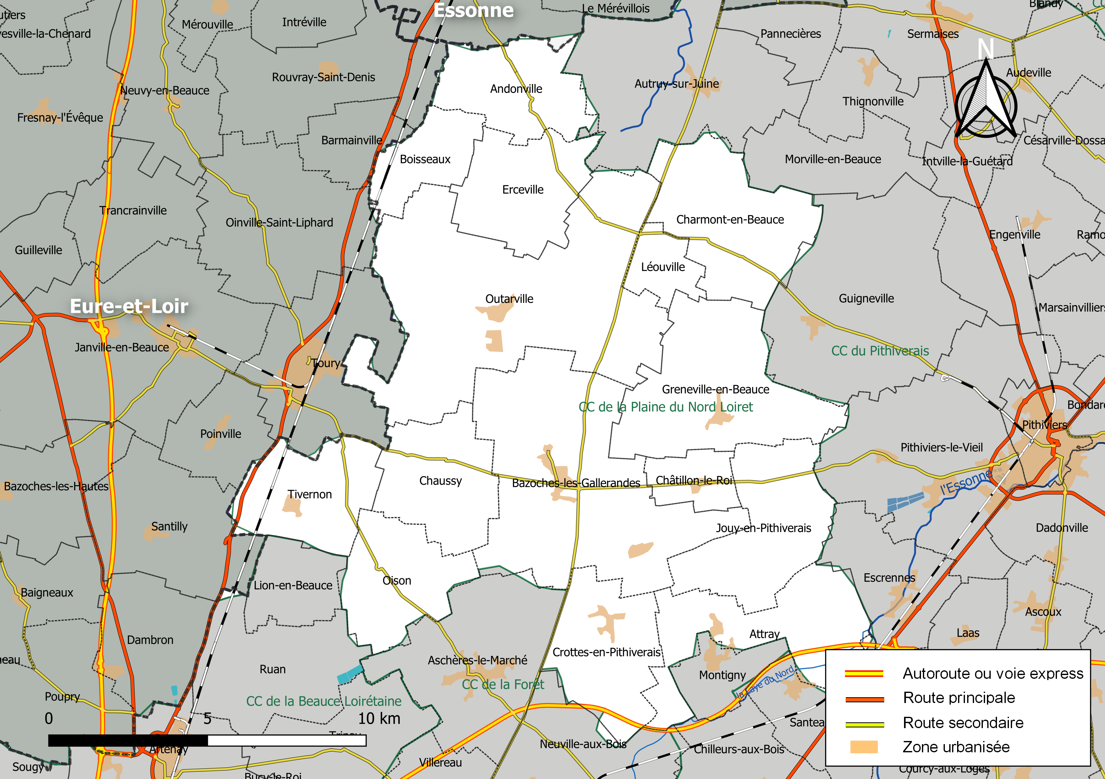 Carte géographique de la communauté de communes de la Plaine du Nord Loiret, département du Loiret, France. Composition au 1er janvier 2019.